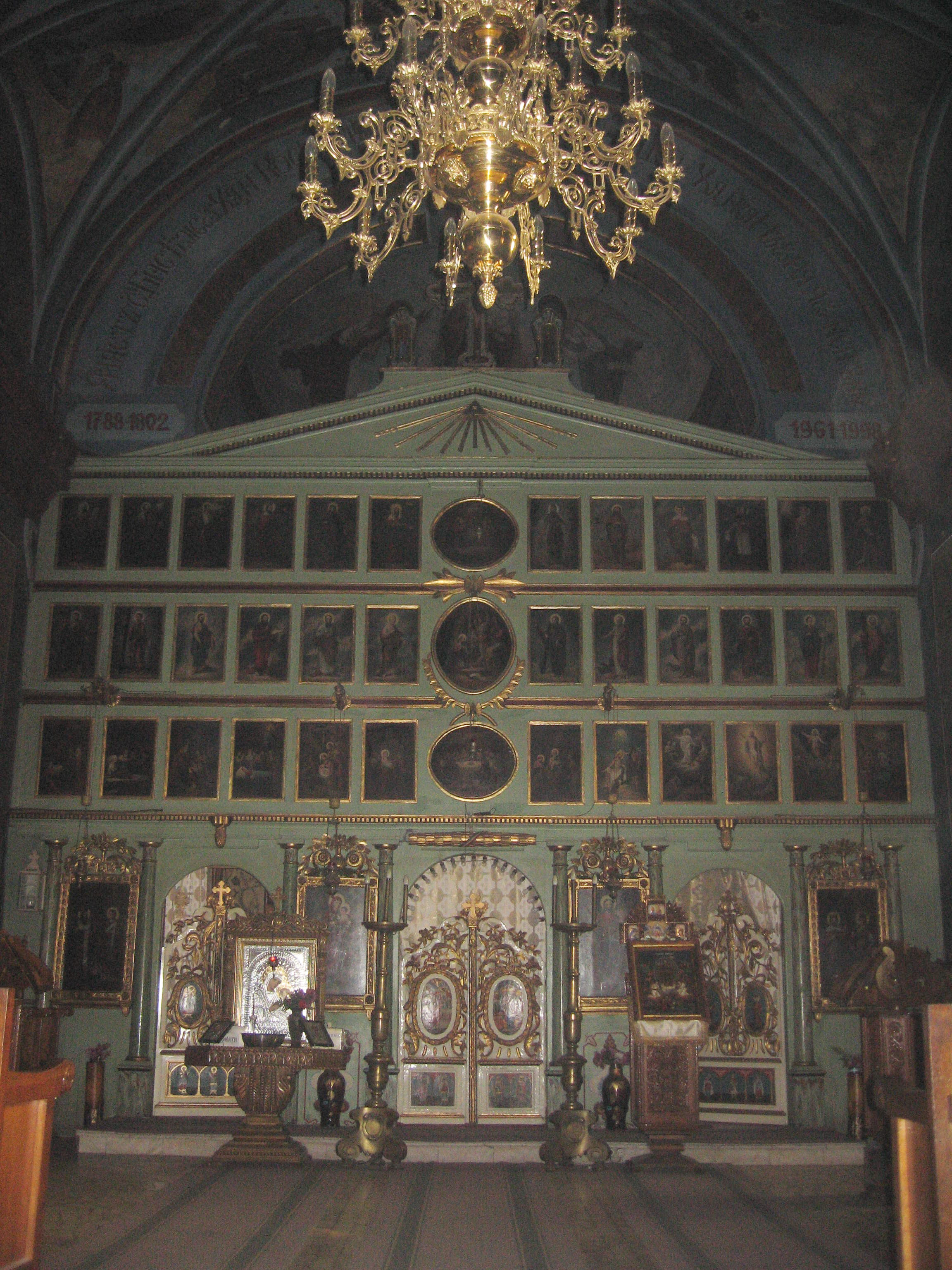 Biserica "Buna Vestire” din Sibiu 01